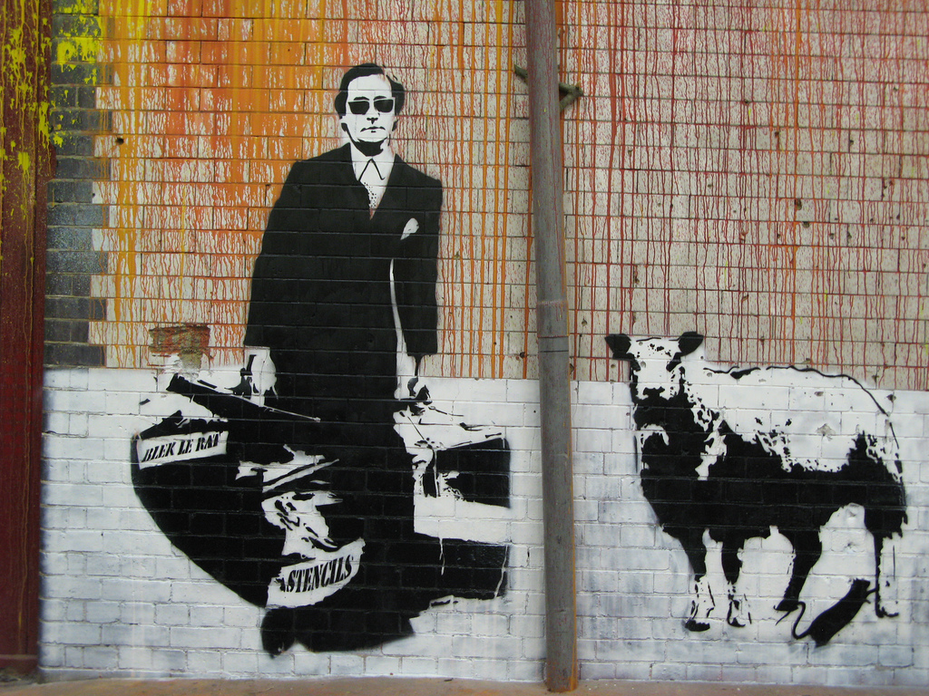 Blek le Rat - Leake Street, Waterloo, London